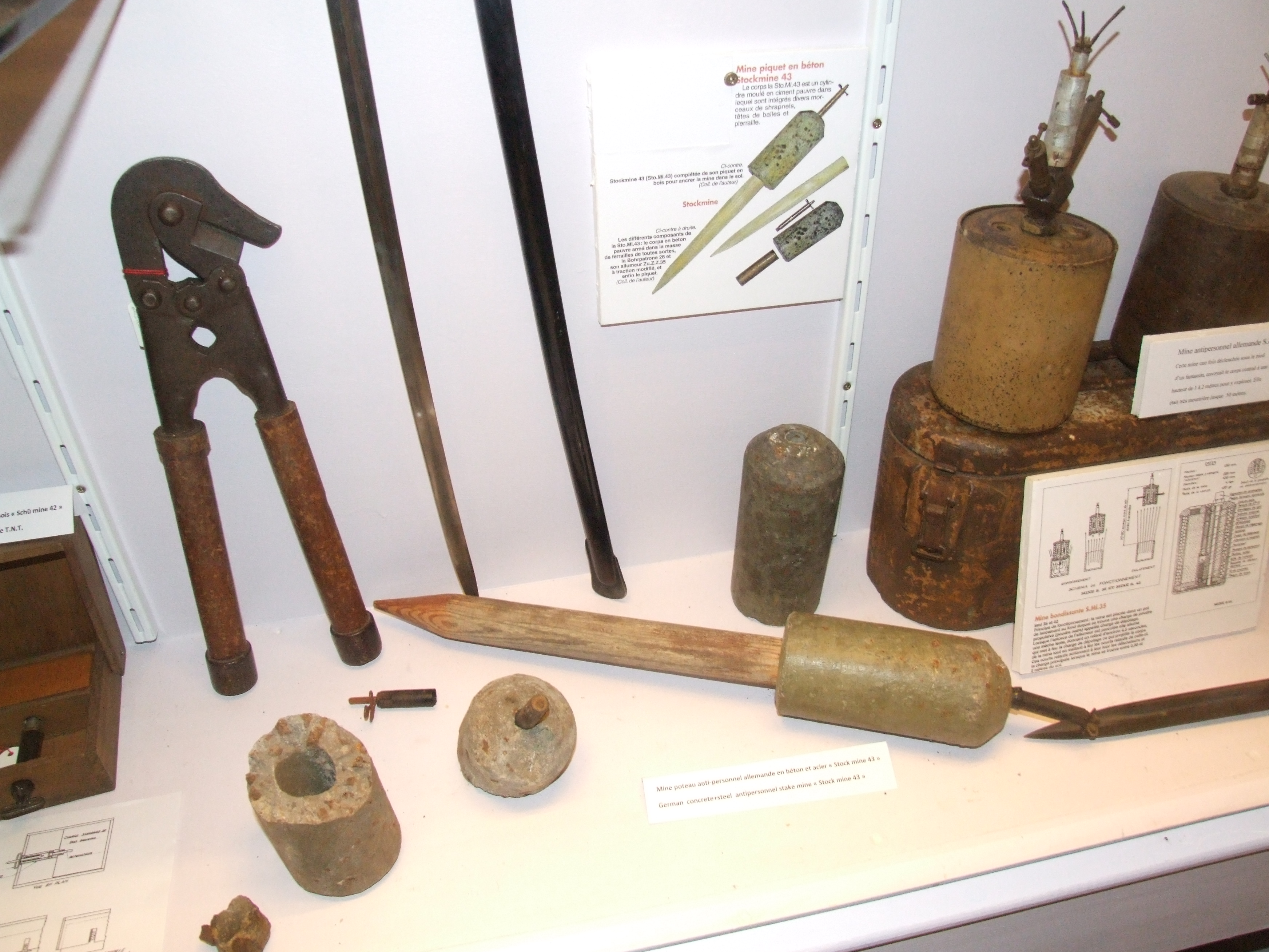 deutsche Stockmine M43 eine Antipersonenmine aus Beton - Mémorial du Souvenir, Dünkirchen